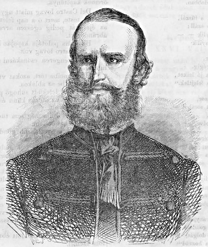 báró Podmaniczky Frigyes (1824–1907) író, politikus (Vasárnapi Ujság, 1862. november 23.)